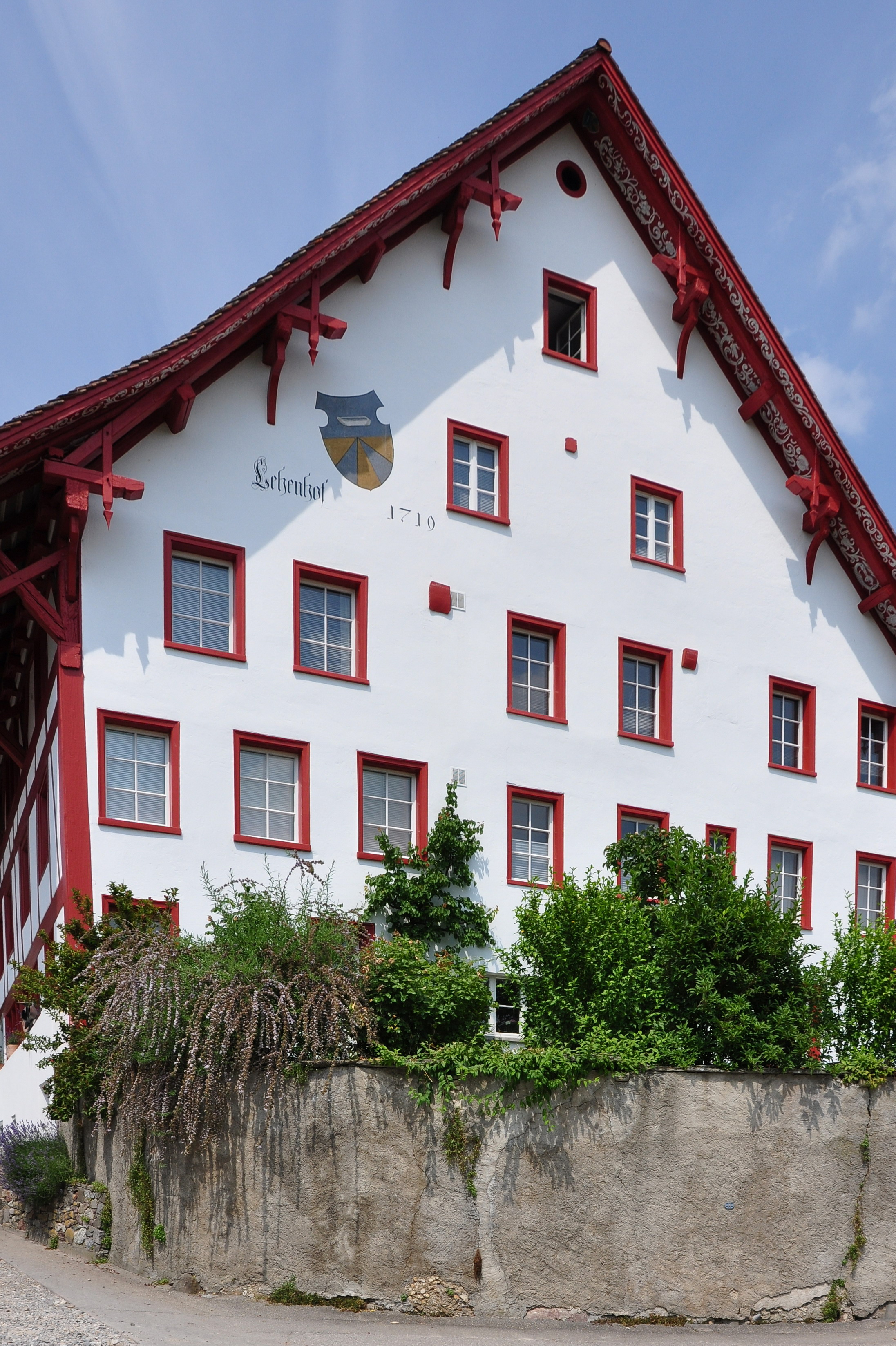 Lehenhof in Seegräben (Switzerland)